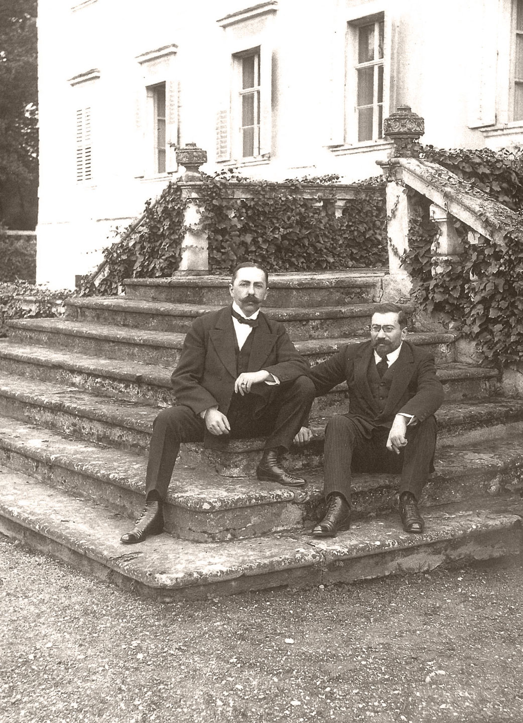 Don Jaime sentado con Juan Vázquez de Mella en la escalinata del palacio de Frohsdorf